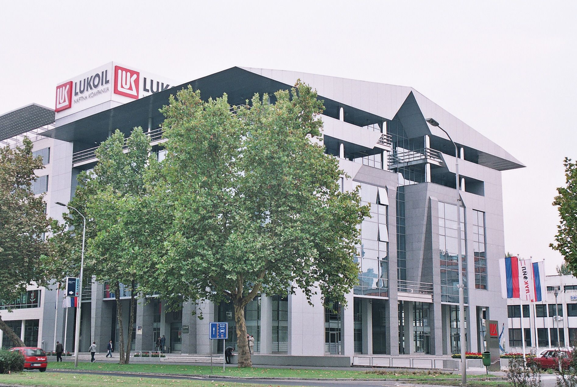 Пословна зграда "Лукоил-Беопетрола" у Београду